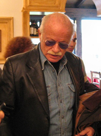 Gino Paoli, italian singer